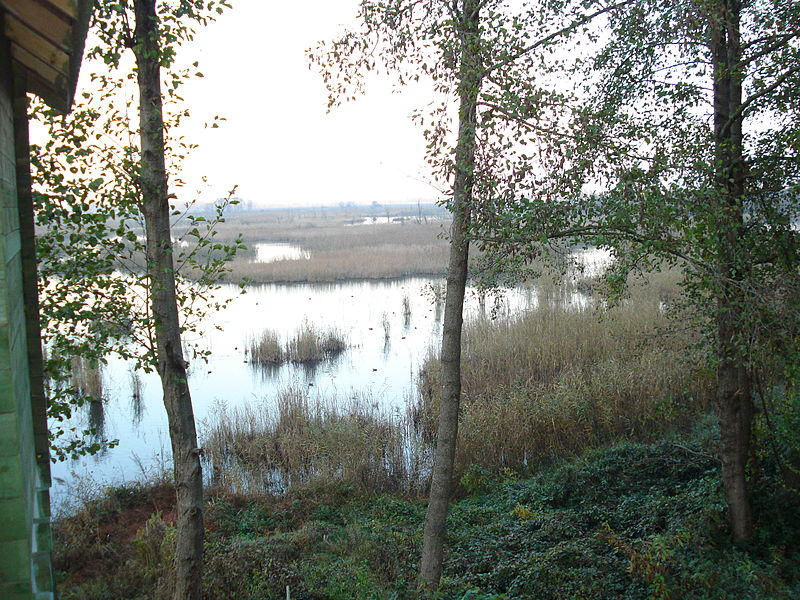 Düzce Gölyaka yaban hayatı koruma sahası